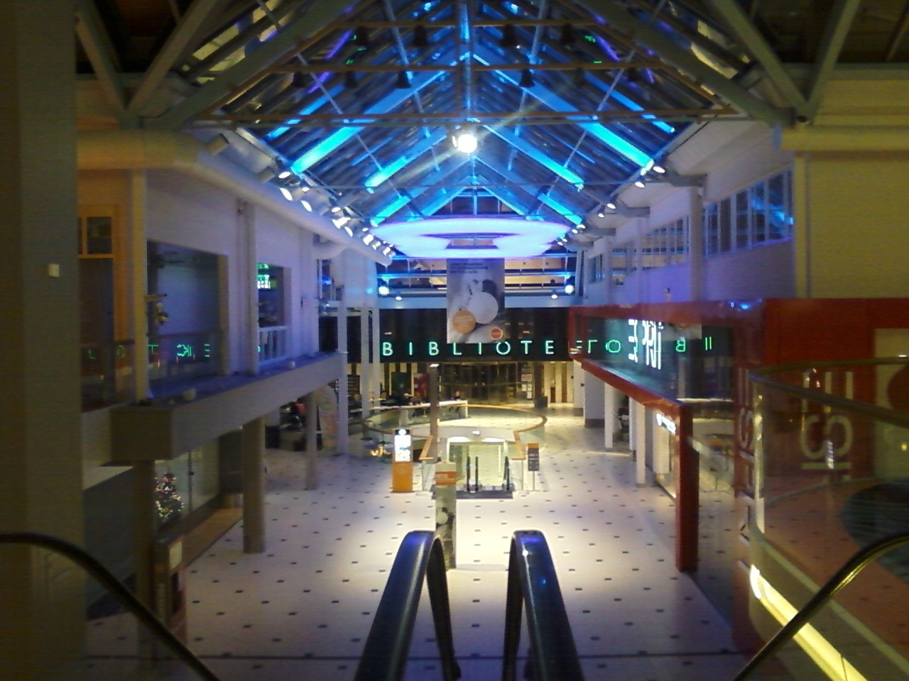 Foto taget över det centralaste torget i Solna Centrum från Hollywood rulltrappan.